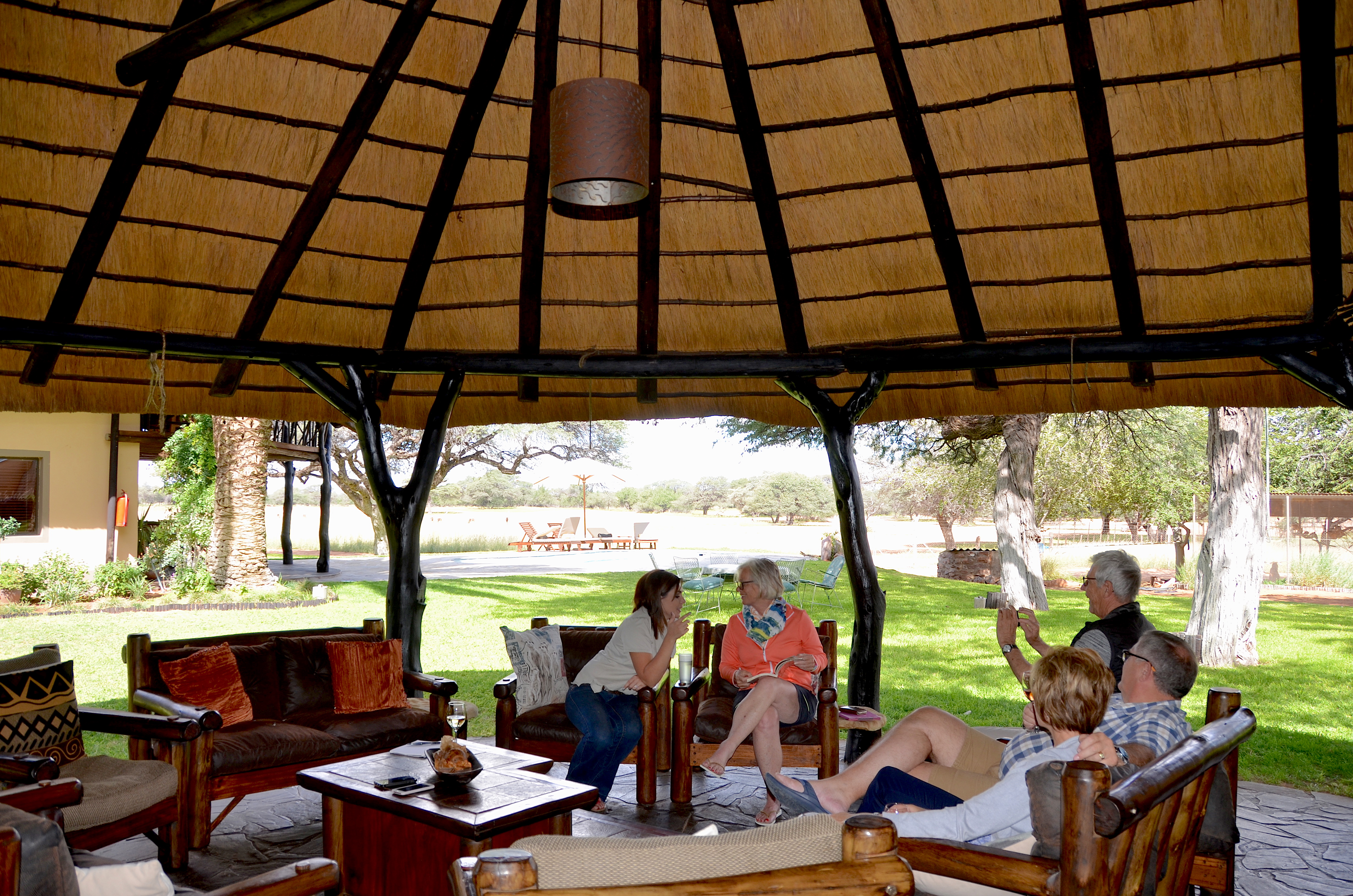 Lapa auf einer Farm in Namibia